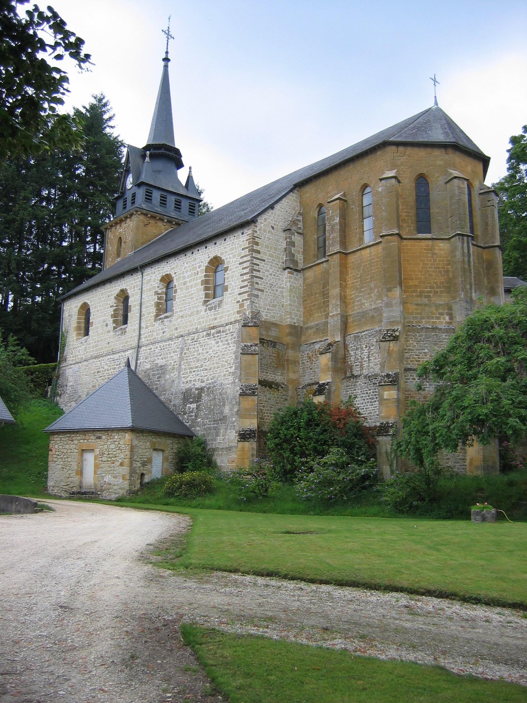 Église de Cornay - Ardennes- France - vue du château de Cornay